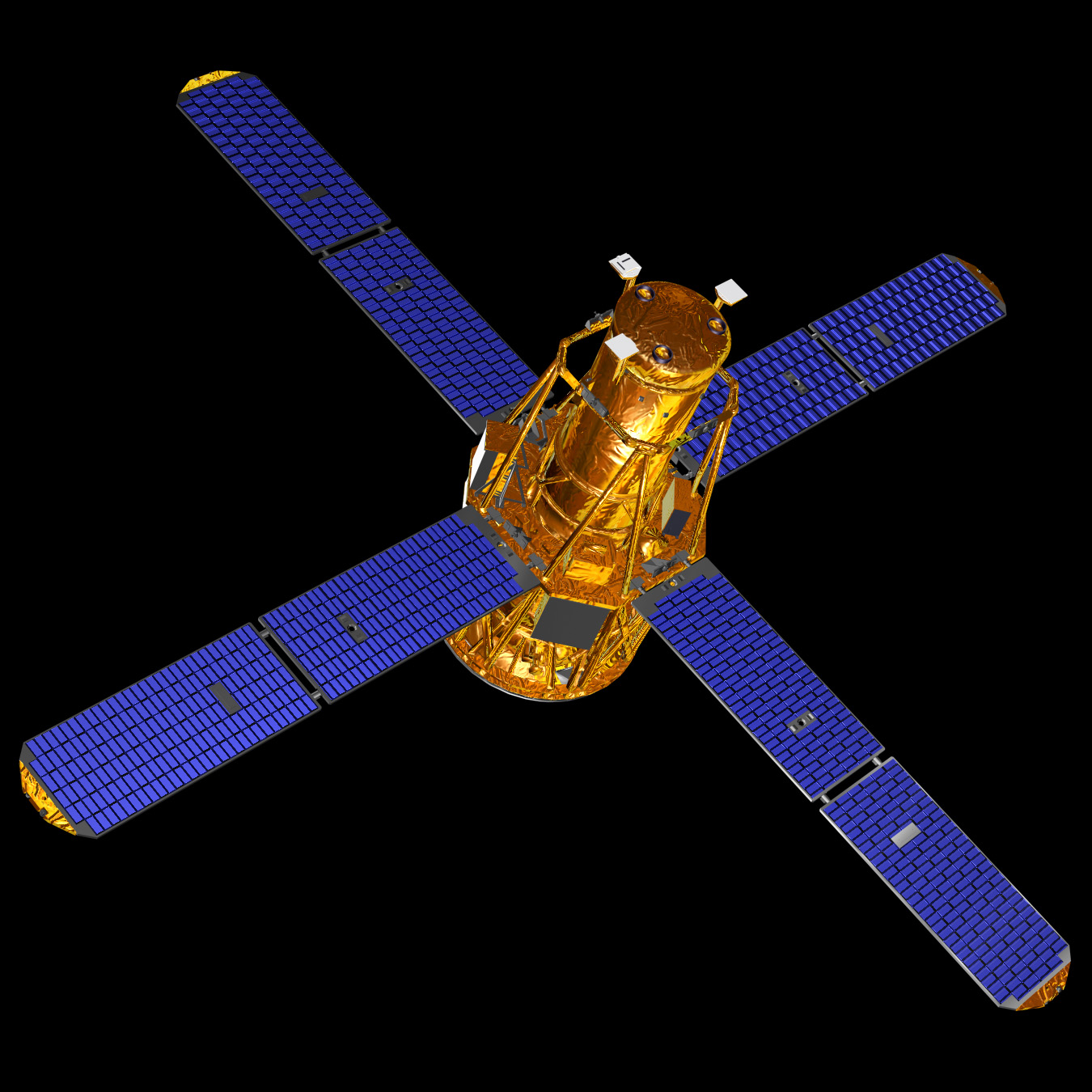 RHESSI space telescope